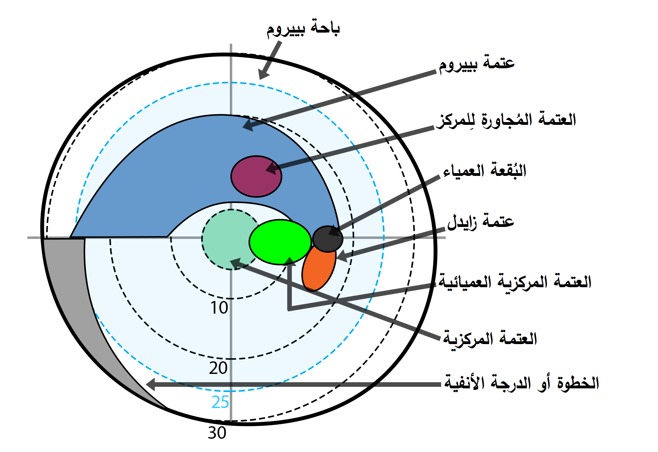 رسمٌ بيانيٌّ يُوضح نطاق الرُؤية عند باحة بييروم، وغيرها من أنواع العتمة.